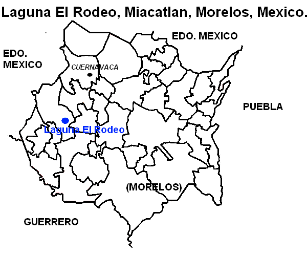 mapa de ubicacion de la laguna el rodeo en miacatlan morelos